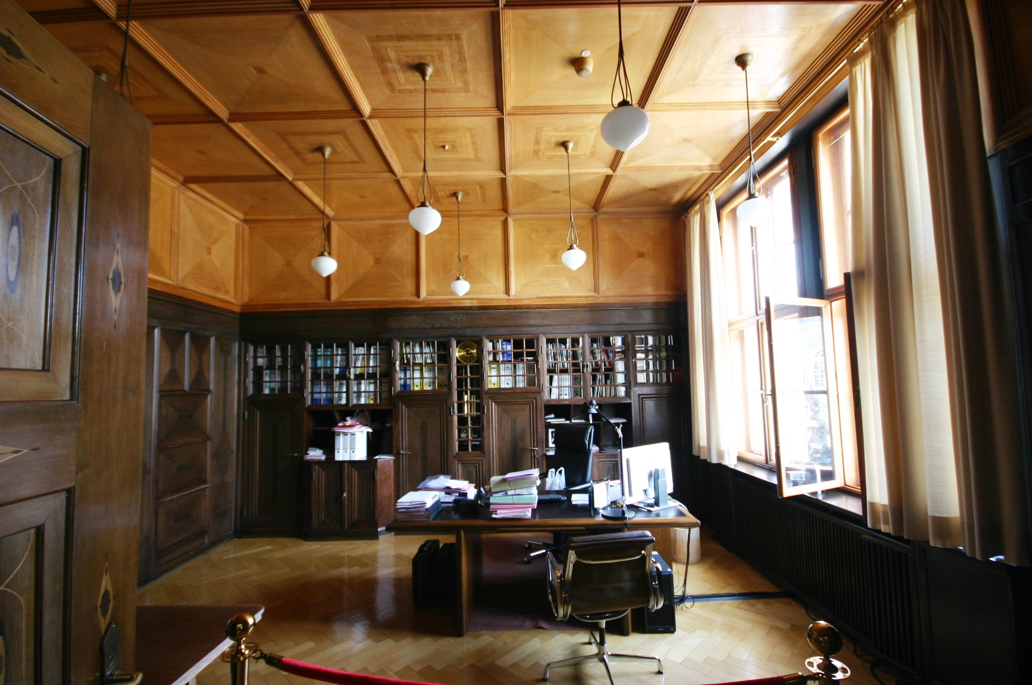 Arbeitszimmer des Regierungspräsidenten im Präsidialbau der Regierung von Oberfranken in Bayreuth (Ludwigstraße 20, 1. OG)